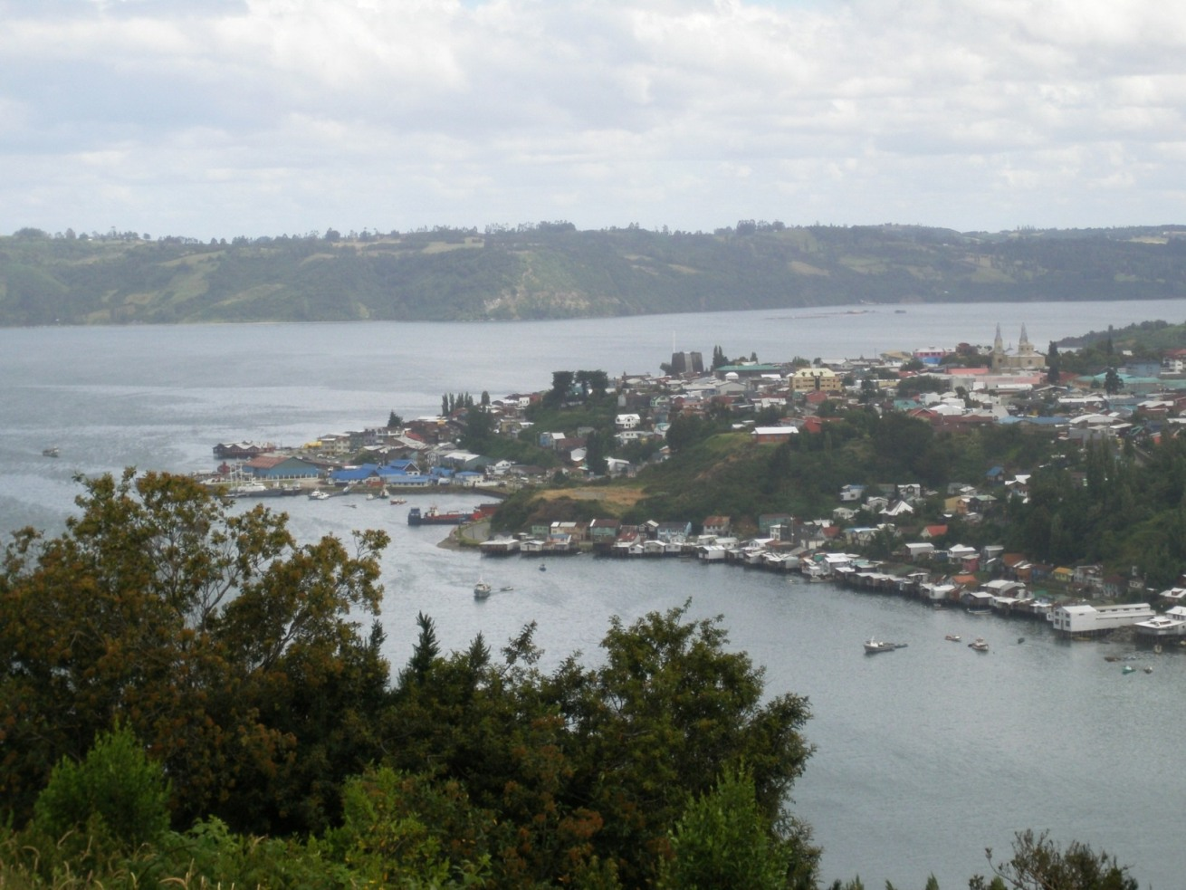 Castro visto desde el mirador de Tentén, Chiloé (Chile)